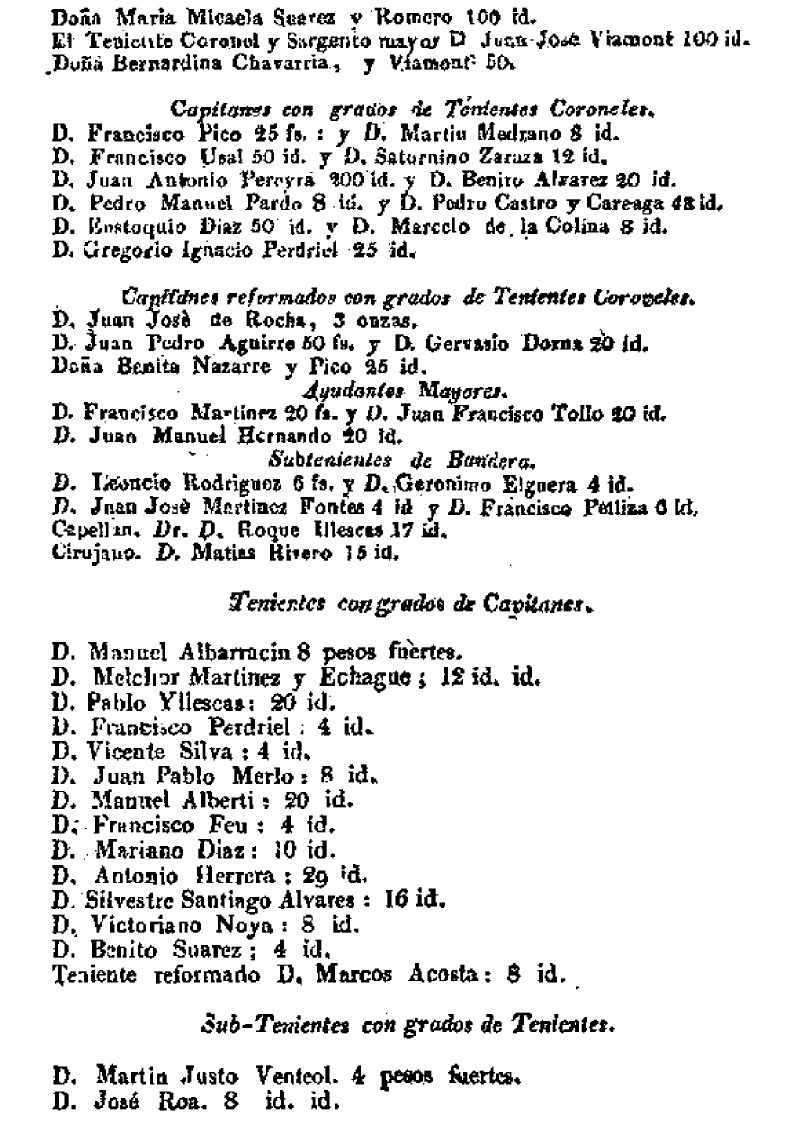 Lista de suscriptores al fondo de apoyo para la creación del primer ejército auxiliar a las provincias interiores (4)